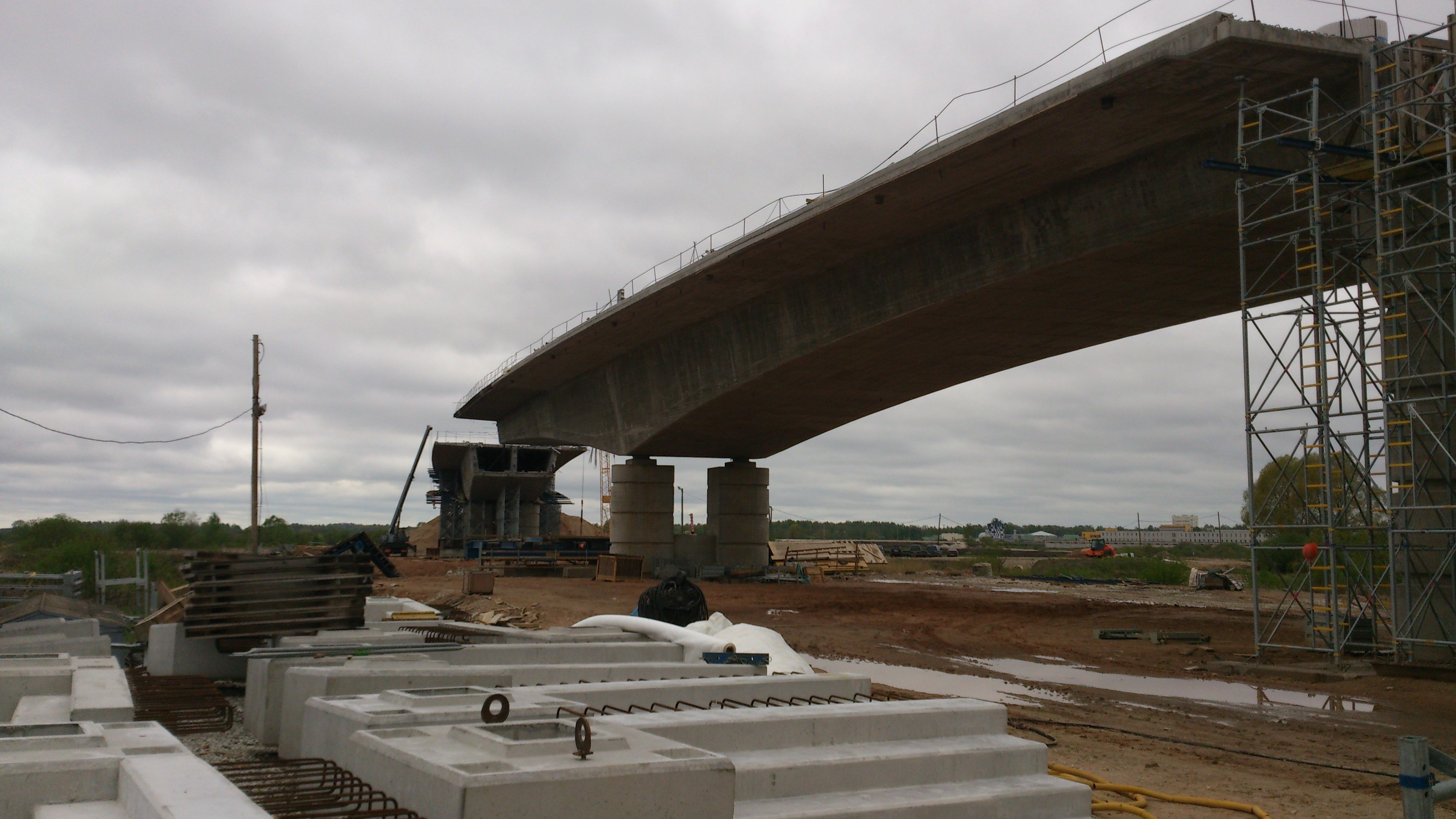 Keerdtrepi elemendid Ihaste silla ehitusel Emajõe Ihaste-poolsel kaldal, 14. mai 2014